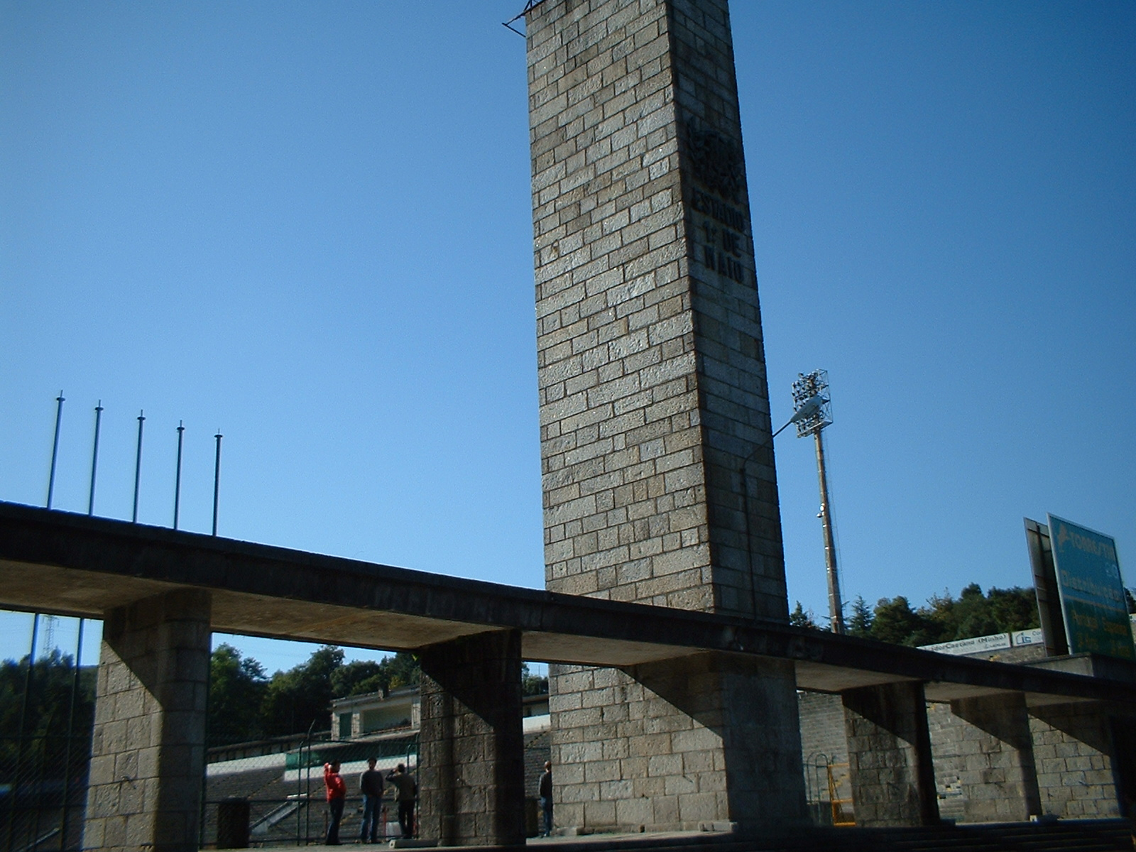 Maratona do Estádio 1º de Maio - Braga Francisco Miguel Rodrigues